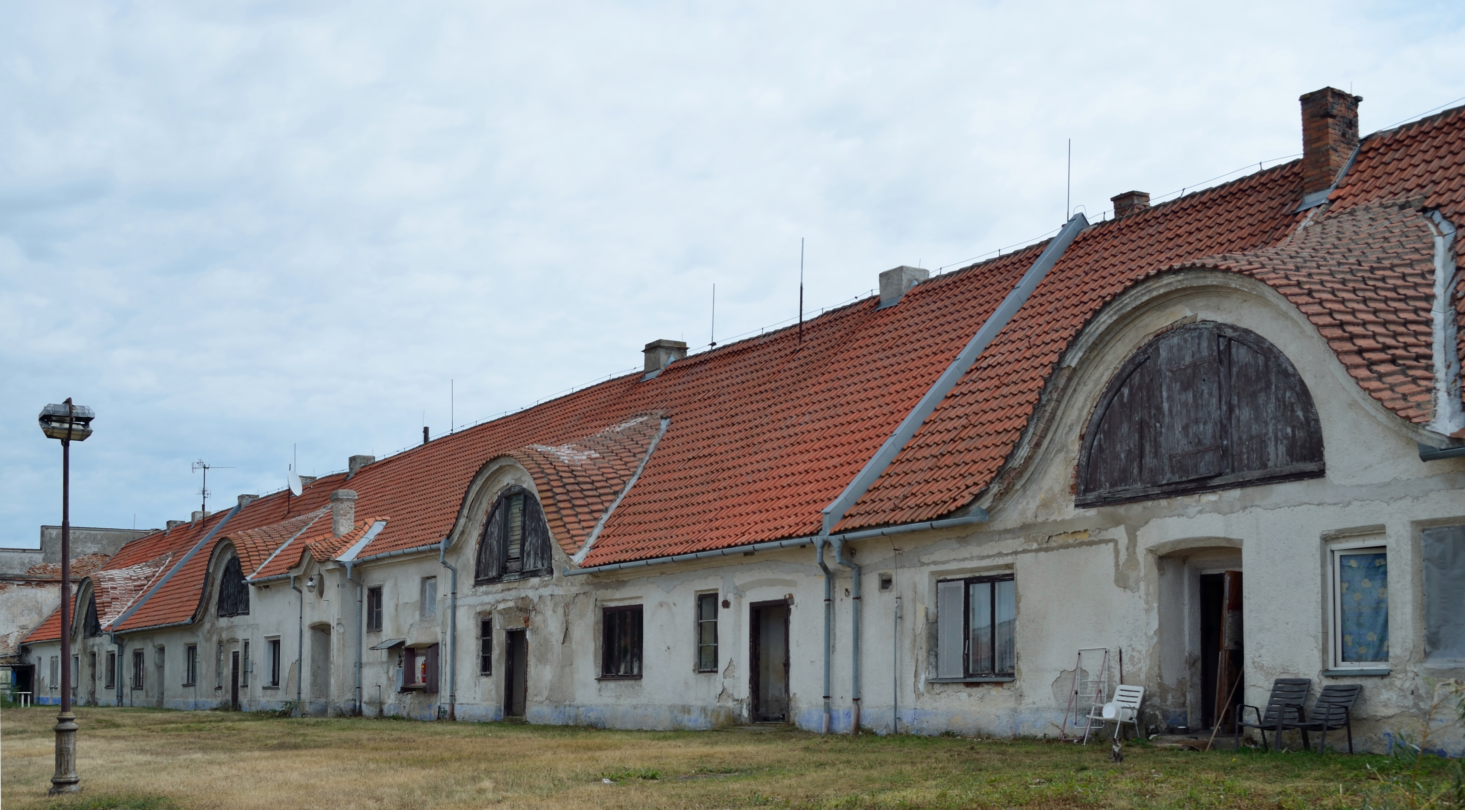 Zemědělský dvůr Nový dvůr (Charvátská Nová Ves), Charvátská Nová Ves